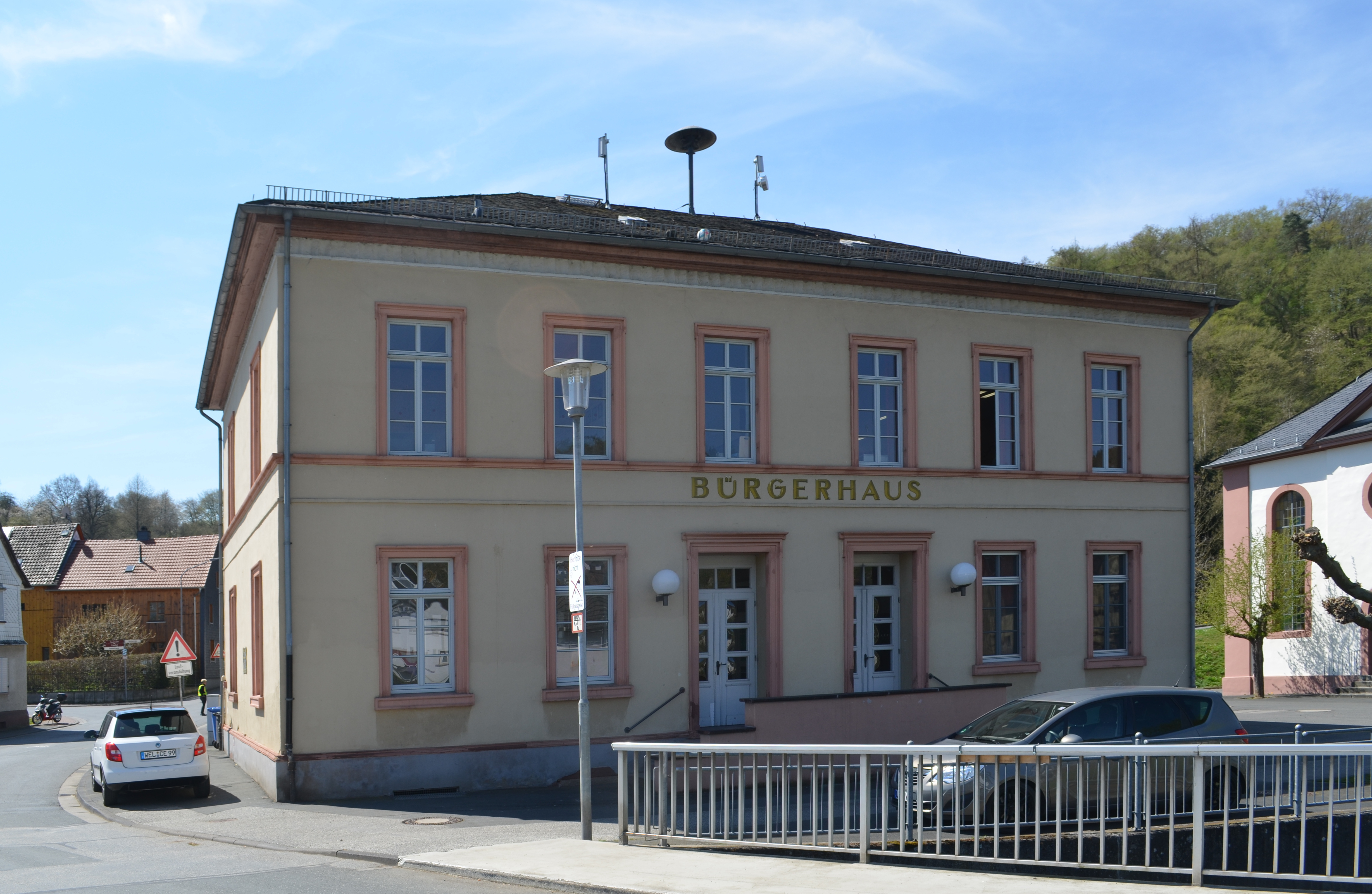 Ernsthausen, Bahnhofstraße 2